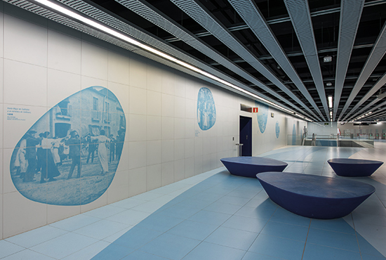 Fira